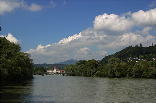 Aare in Aarau